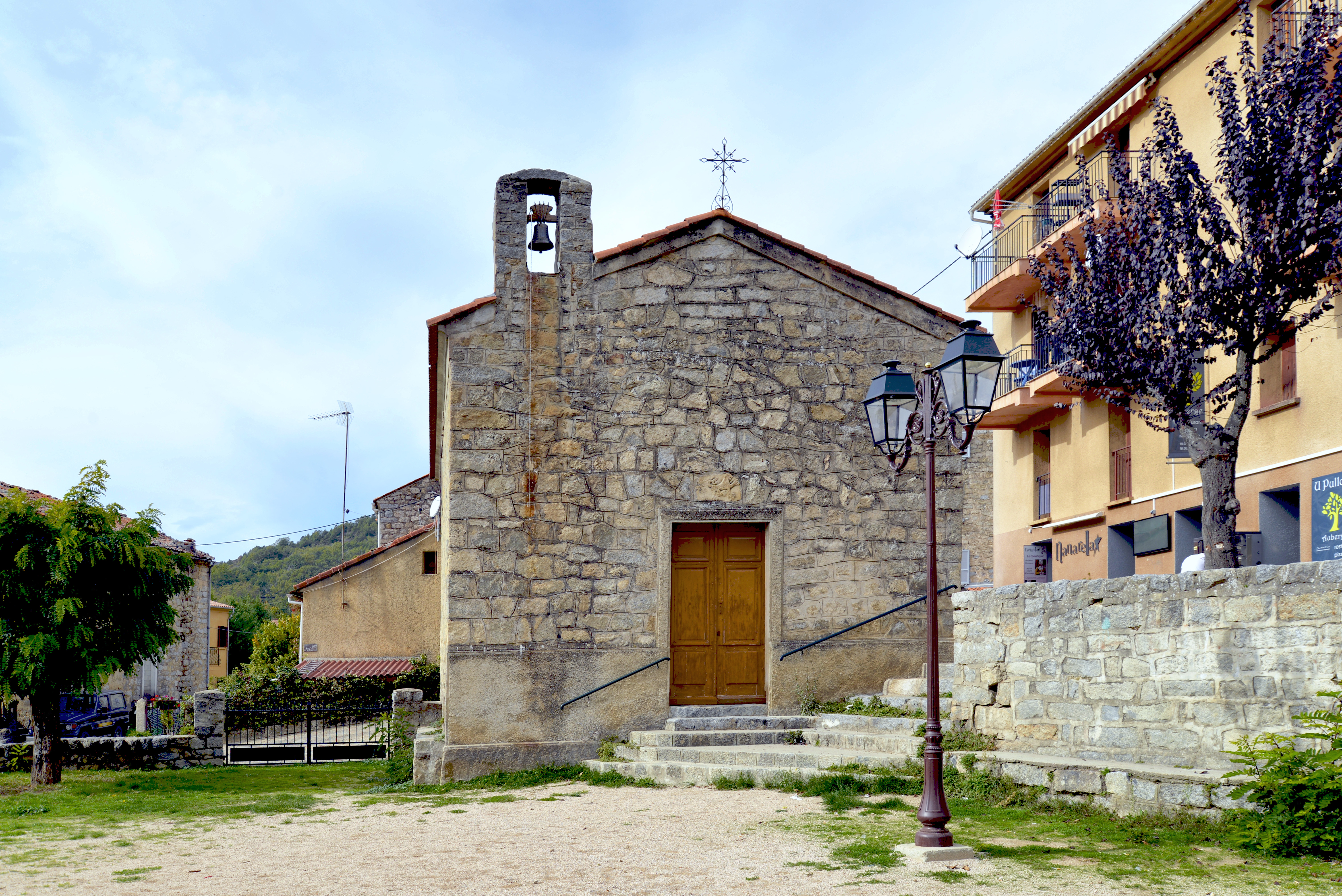 Bastelica, Prunelli (Corse) - Chapelle L'Anunziata à Dominicacci